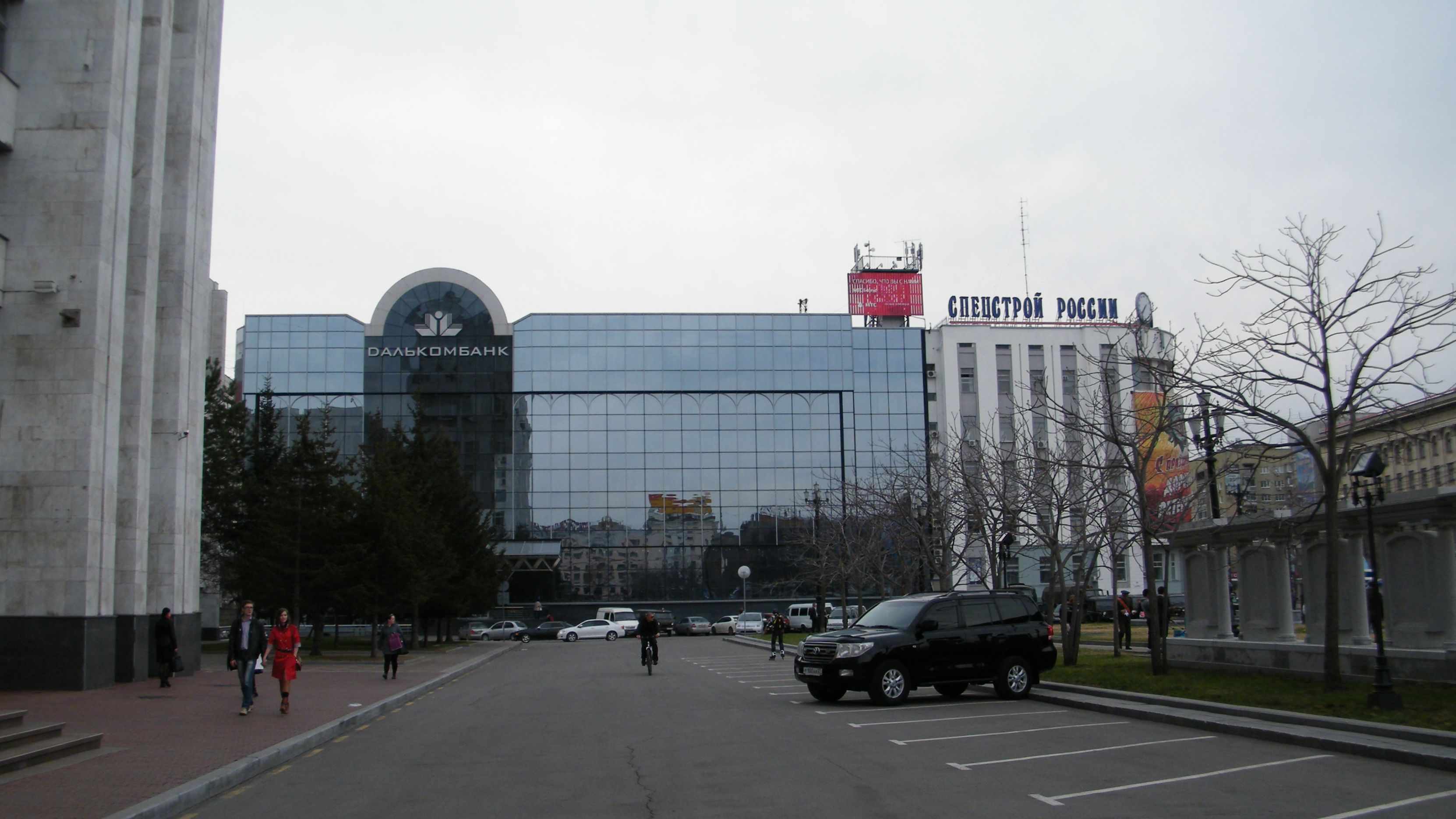 Здание Далькомбанка, Хабаровск